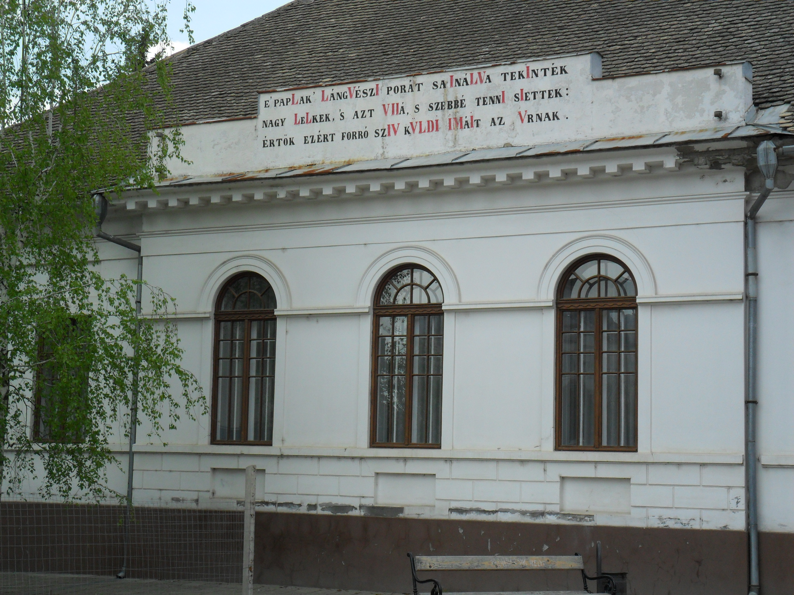 R. k. plébániaház (Baja, Szent Imre tér) This is a photo of a monument in Hungary, Identifier: 2121